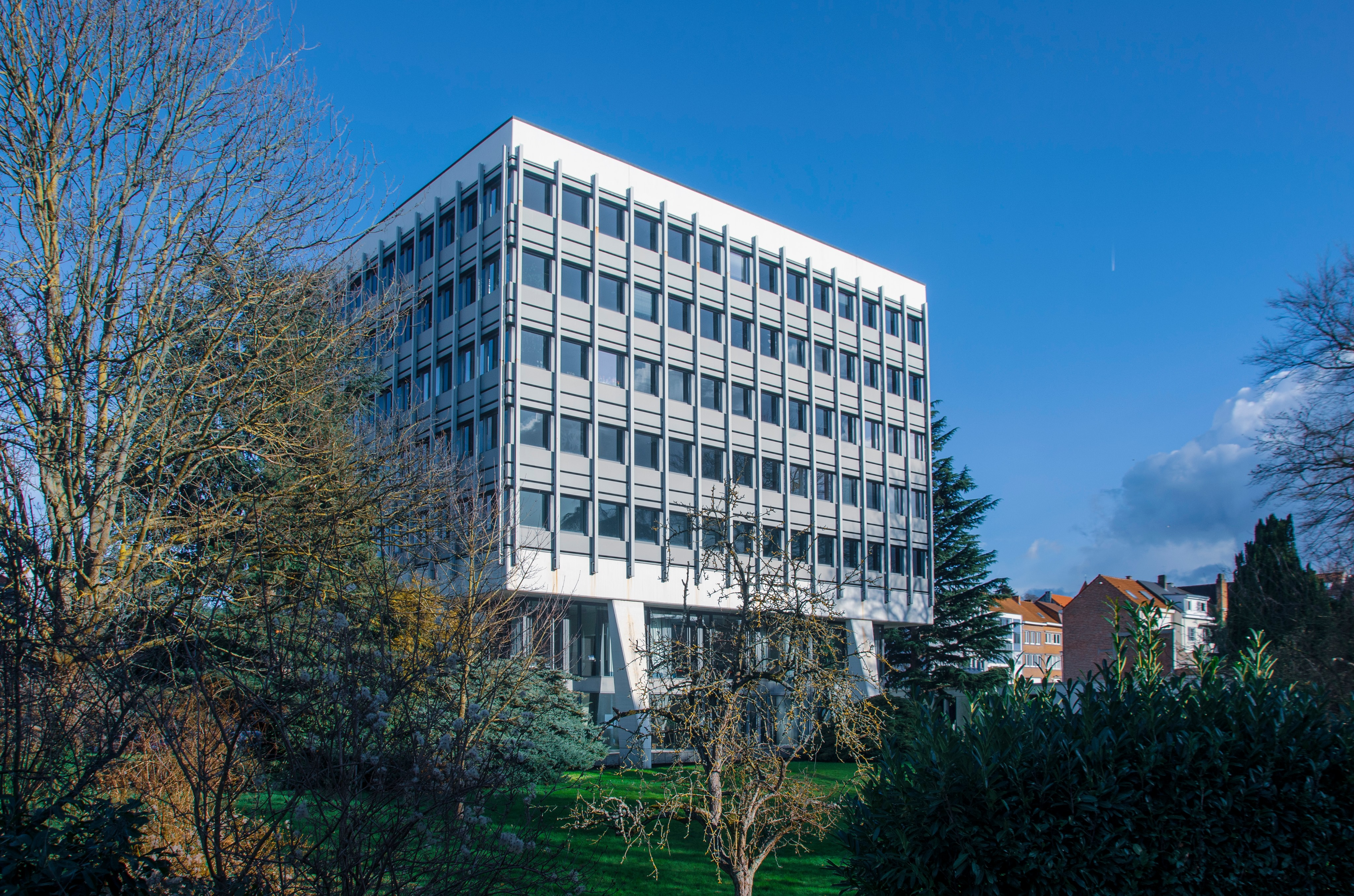 photographie façade